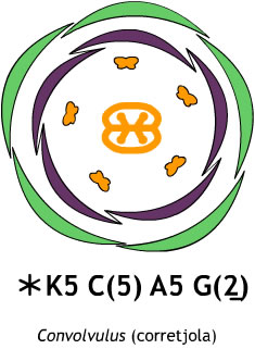 Diagrama floral de corretjola (Convolvulus).